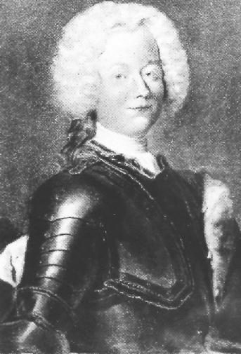 Leopoldo di Anhalt-Khoten